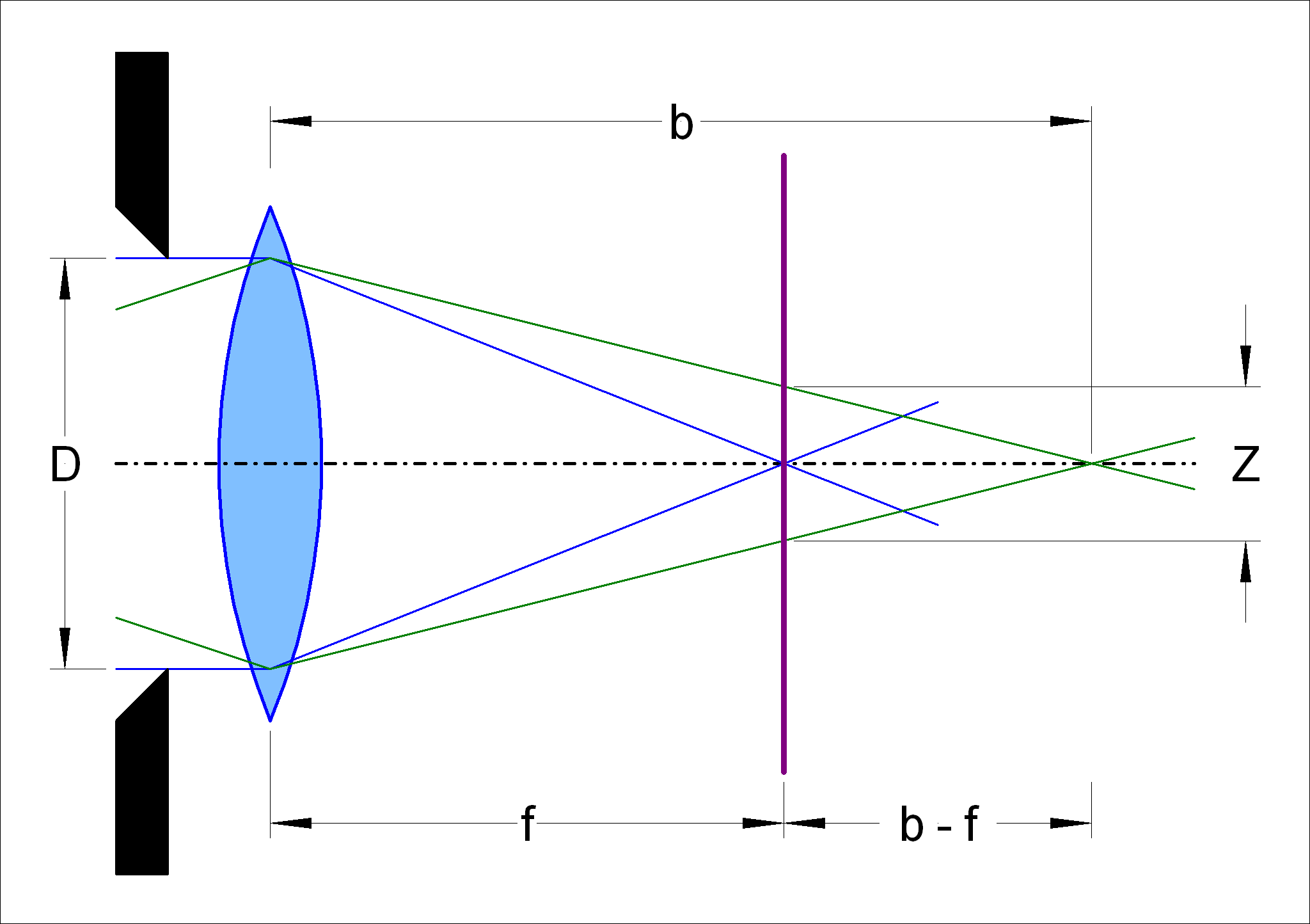 Zusammenhang zwischen Zerstreuungskreisdurchmesser Z, Eintrittspupillendurchmesser D, Brennweite f und Bildweite b